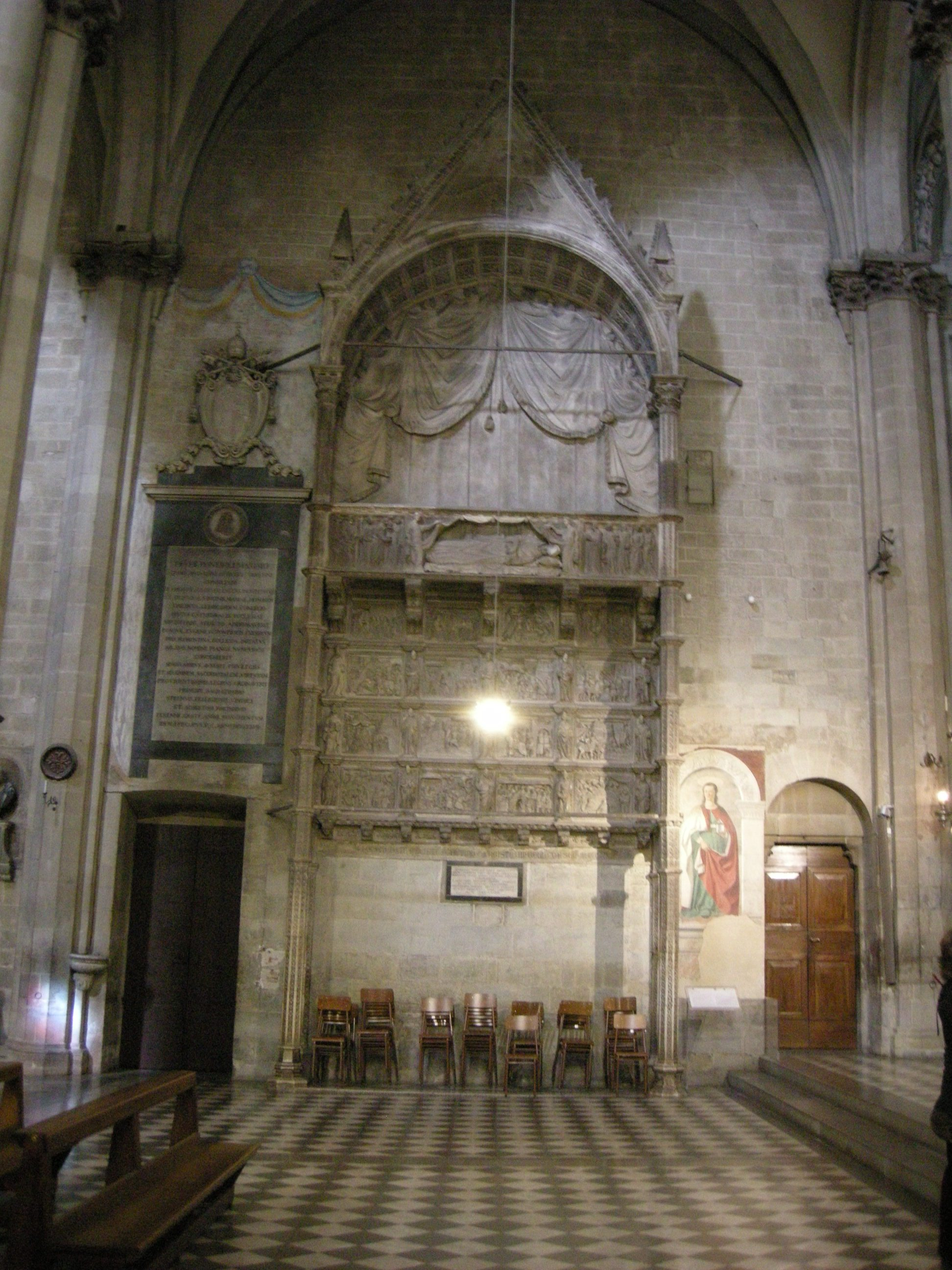 Duomo di arezzo, interno, monumento funebre di Guido Tarlati, 1330